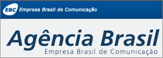 Logotipo oficial da Agência Brasil.